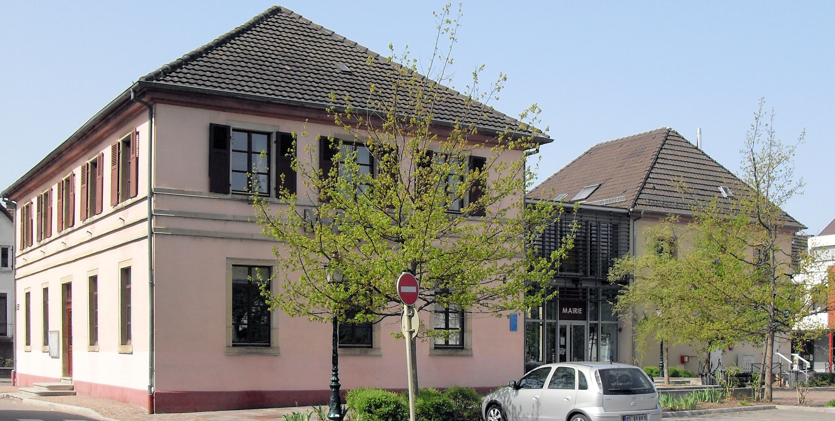 La mairie de Zillisheim